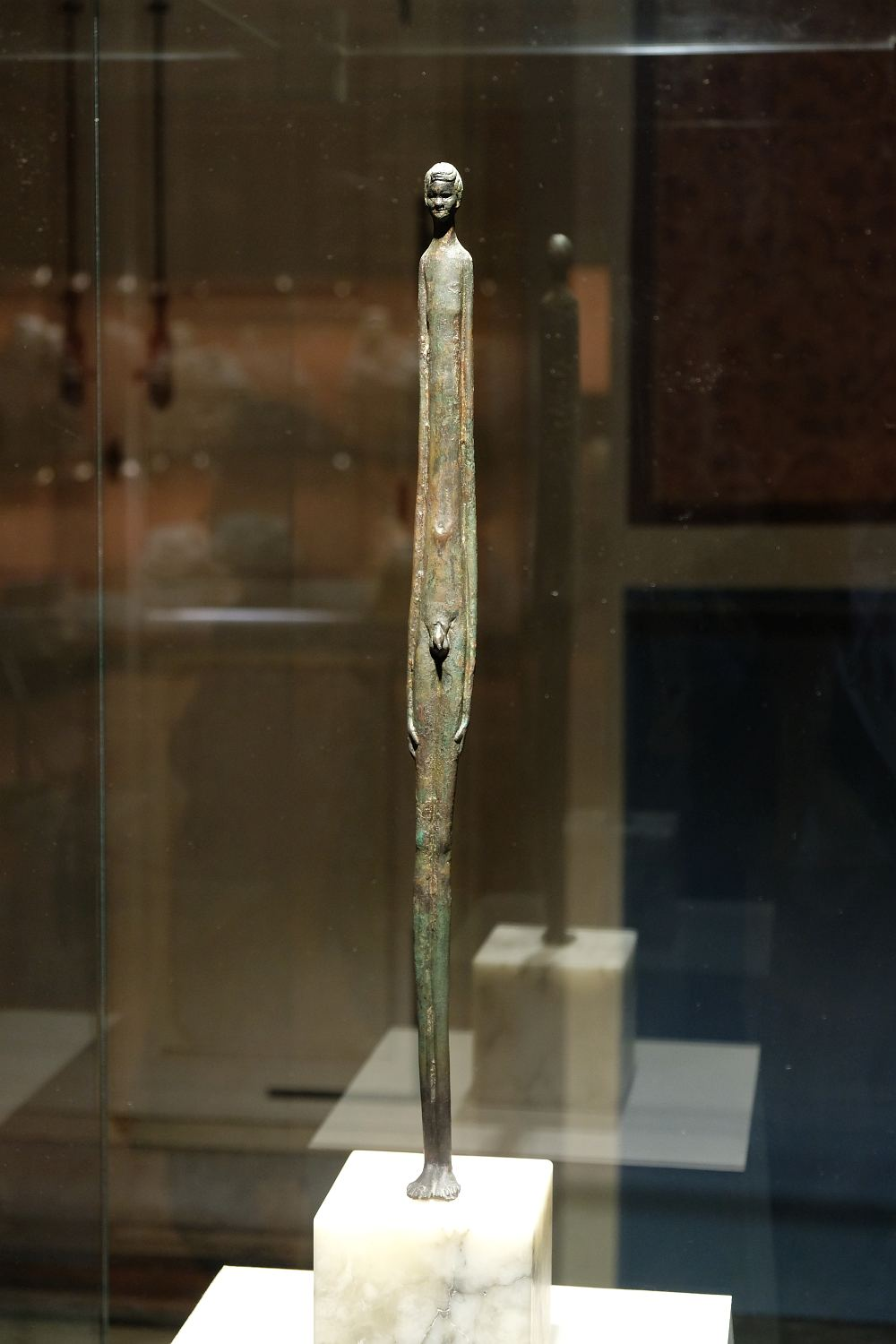 Die etruskische Bronezefigur Ombra della Sera im Museo Etrusco Guarnacci in Volterra